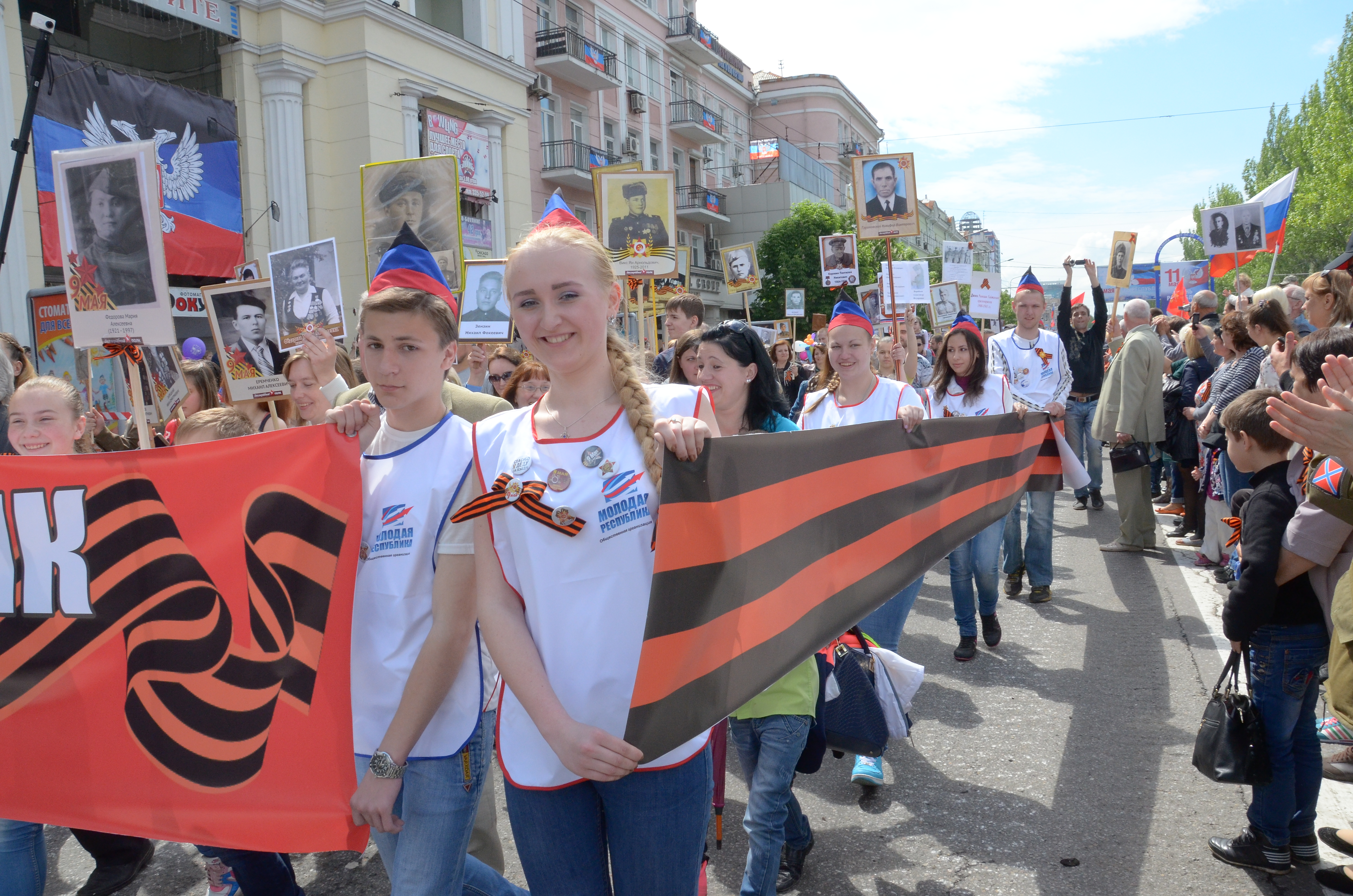 День Победы в Донецке